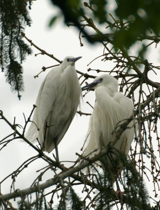 Couple d'Aigrettes garzette. Auteur : Sylvain HAYE